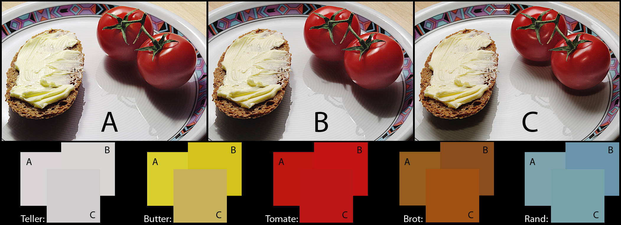 Beispiel für Metamerie durch unterschiedliche Beleuchtung: mit einer Kompaktleuchtstofflampe (A), einer HV-Halogenglühlampe (B) und einem Blitz (C). Die Farbflächen der Farbvergleiche wurden den Originalfotos punktförmig an identischen Stellen entnommen. Zur Verdeutlichung wurden die Farbpunkte flächig vergrößert.